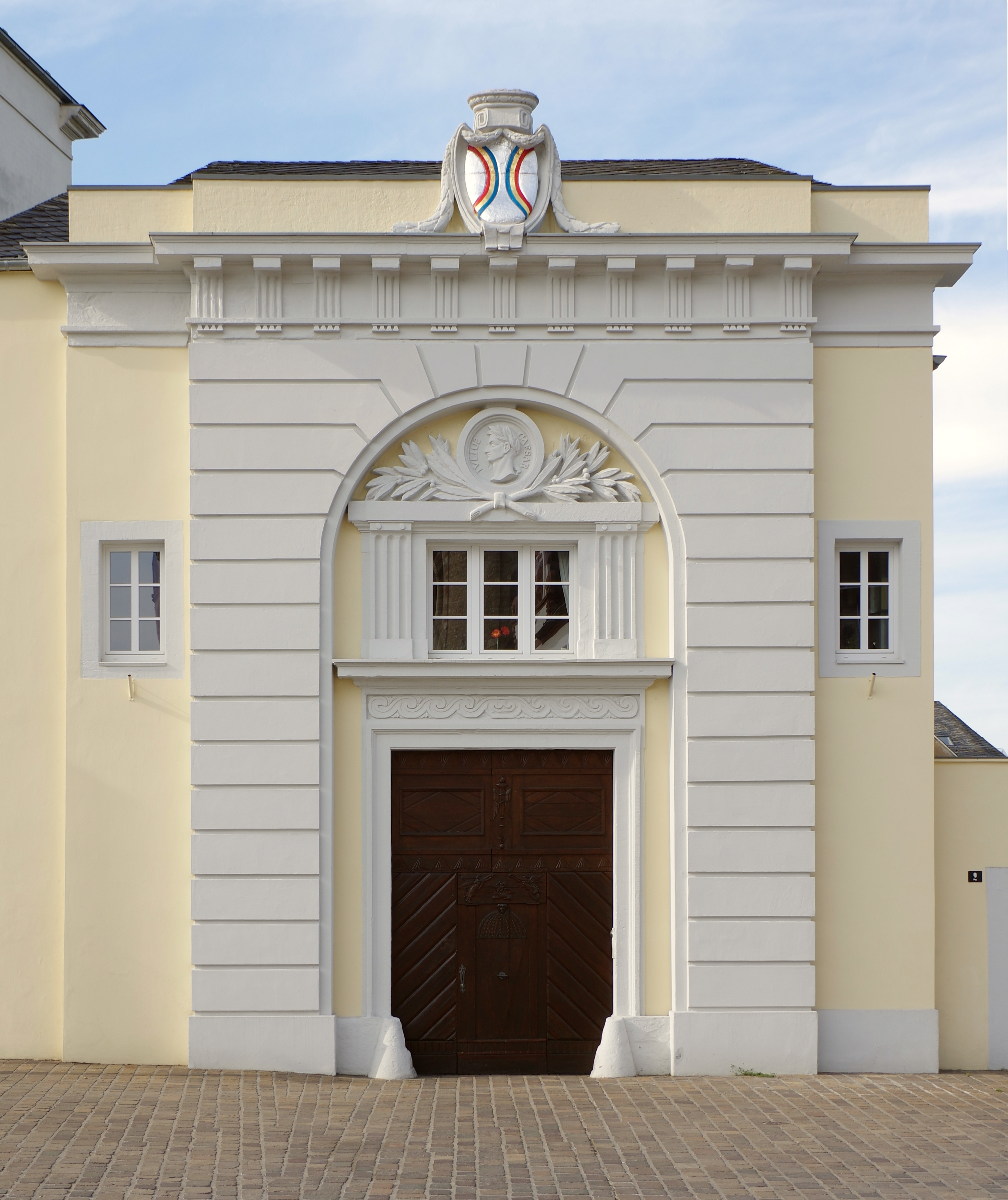 Trier, Domfreihof 2